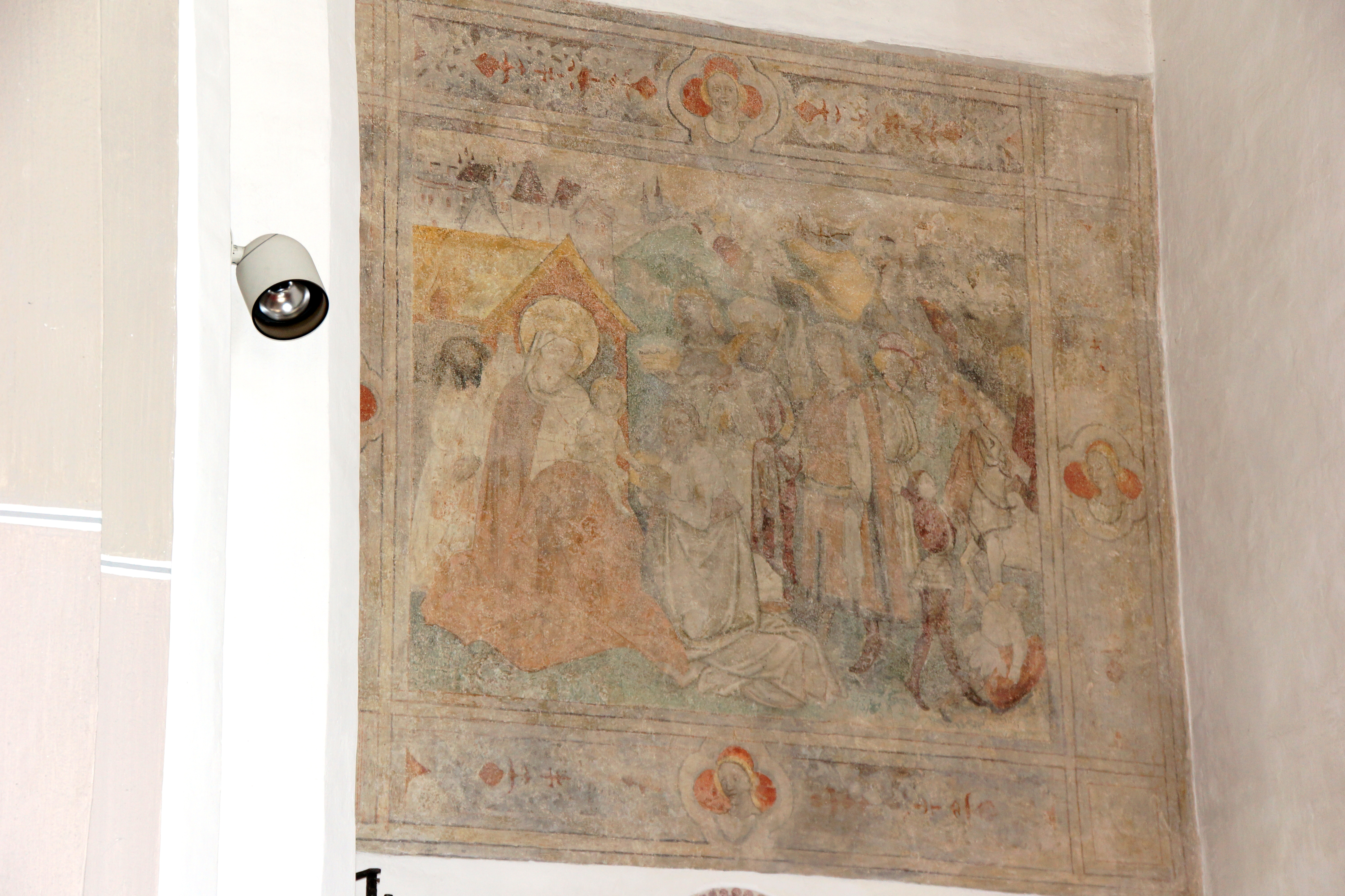 Die katholische Filial- und Marktkirche St. Johann Baptist im Oberbayerischen Neumarkt St. Veit